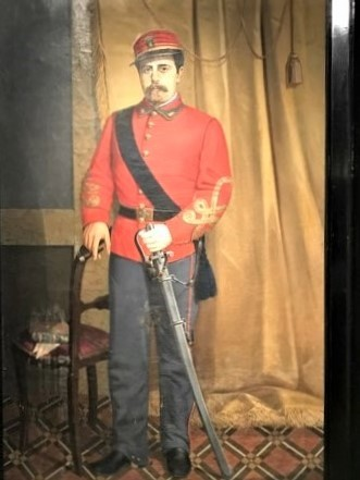 Quadro raffigurante Raffaele De Benedetto. Museo del Risorgimento. Palermo